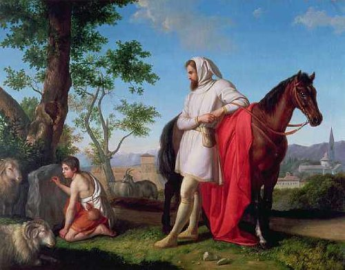 Cimabue e Giotto, olio su tela, Palazzo Pitti, Firenze